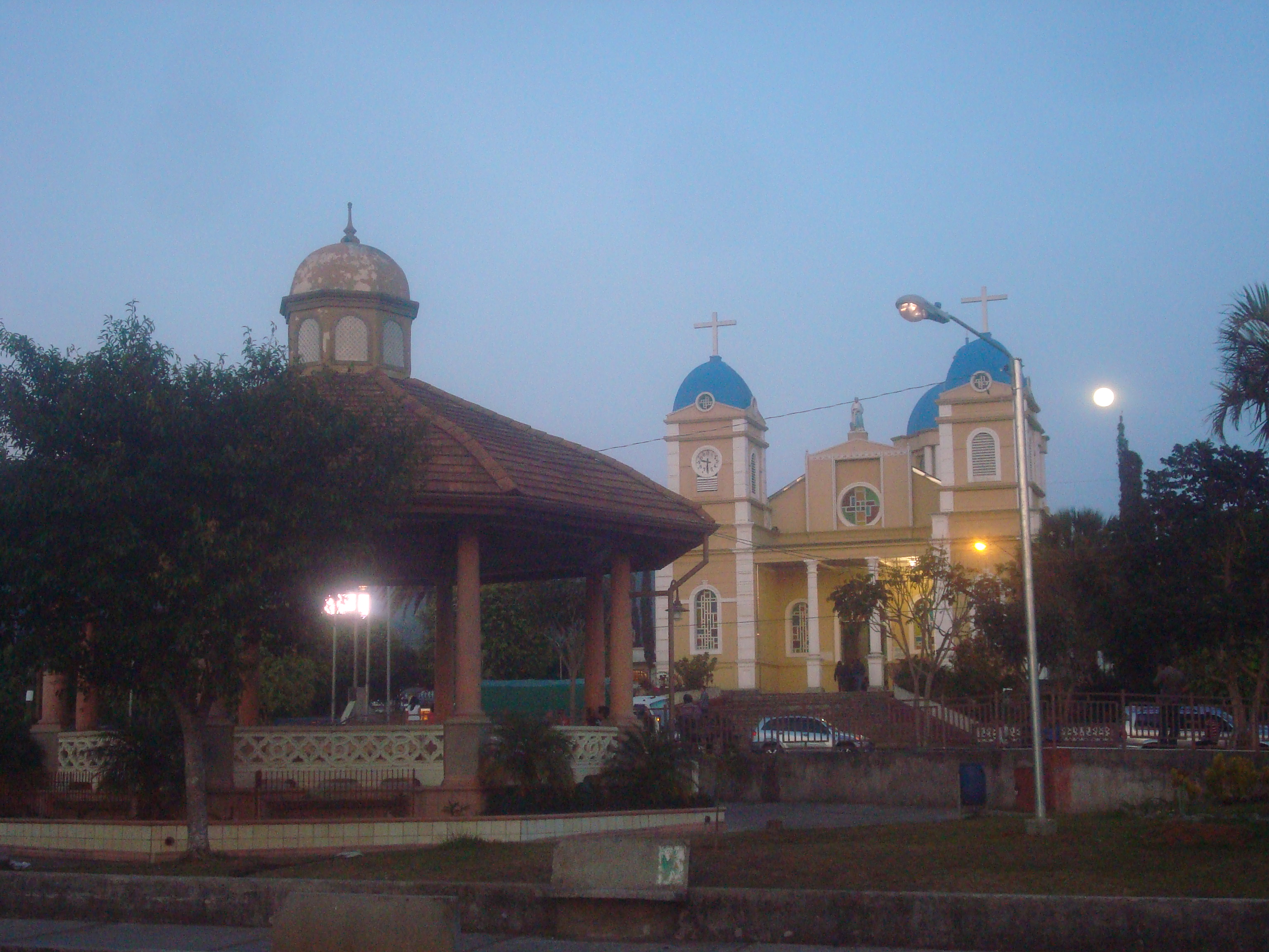 Iglesia, kiosco y luna en San Marcos de Tarrazú, Costa Rica.